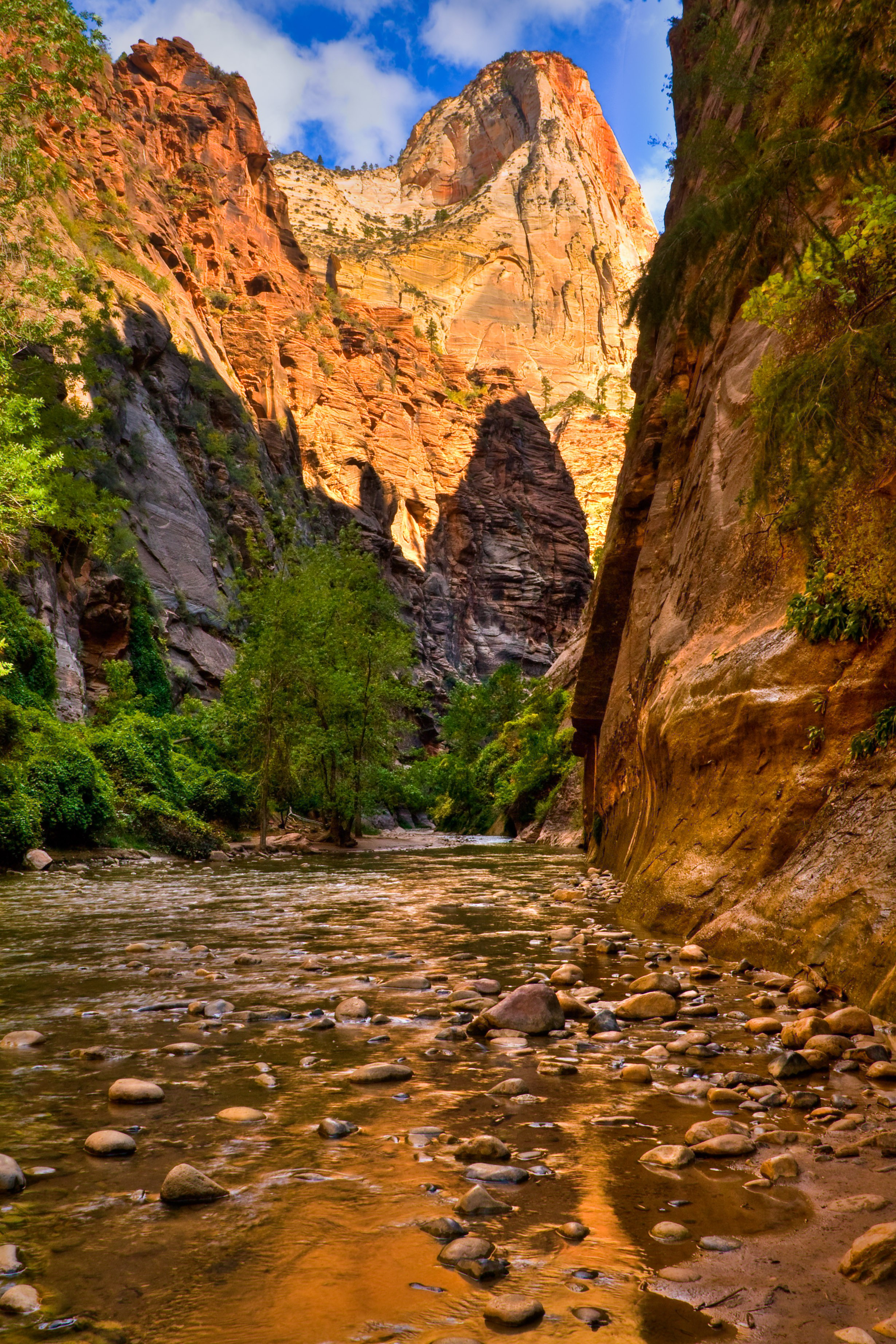 Virgin River, Zion NP 2009.